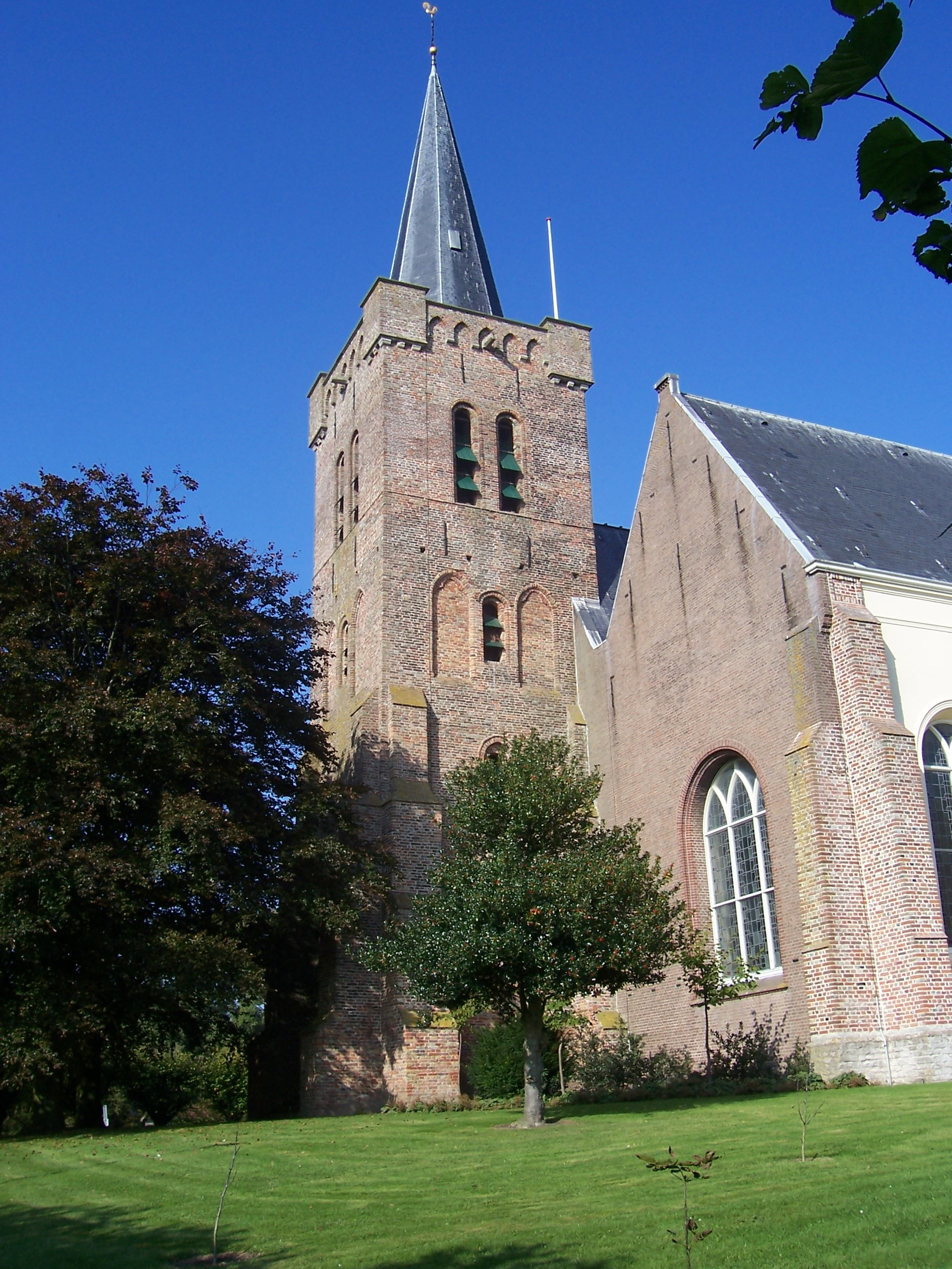 Kerk van Wemeldinge